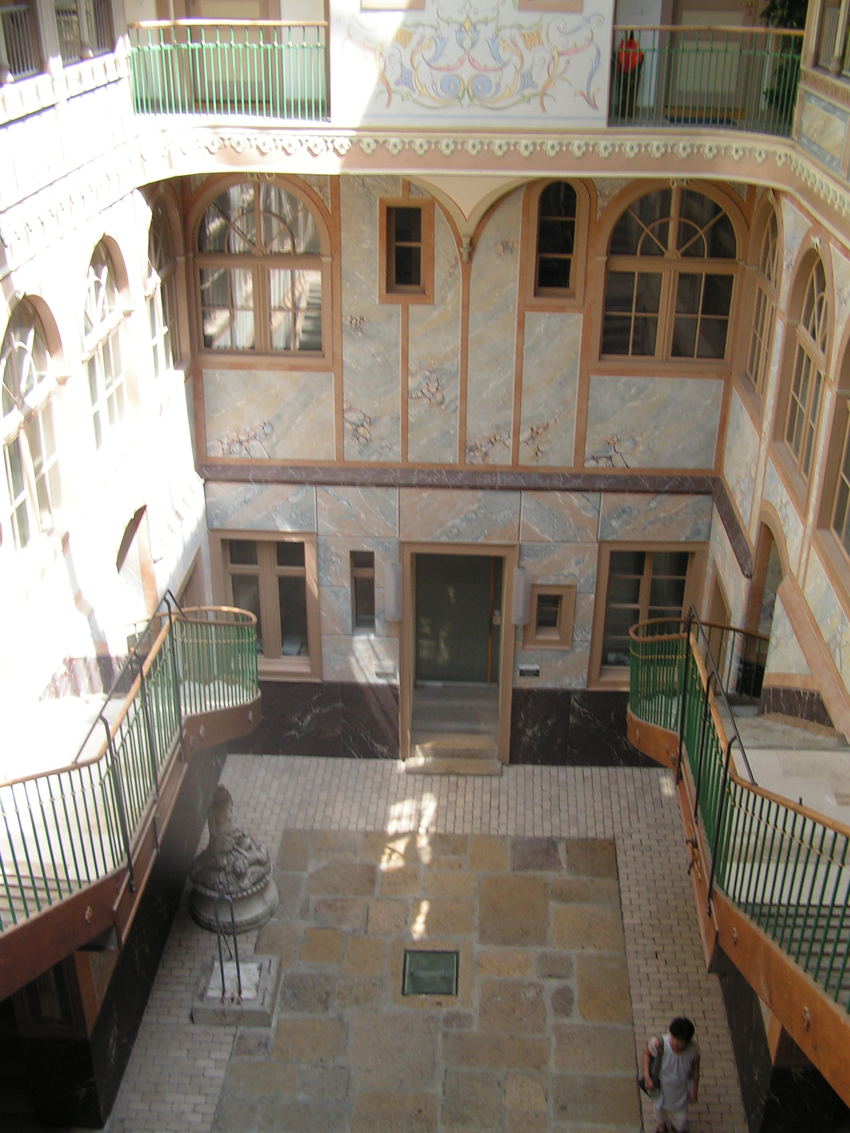 Ancien manège. 19 rue du Manège à La Chaux-de-Fonds en Suisse